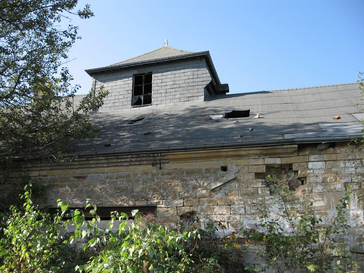 Truffy